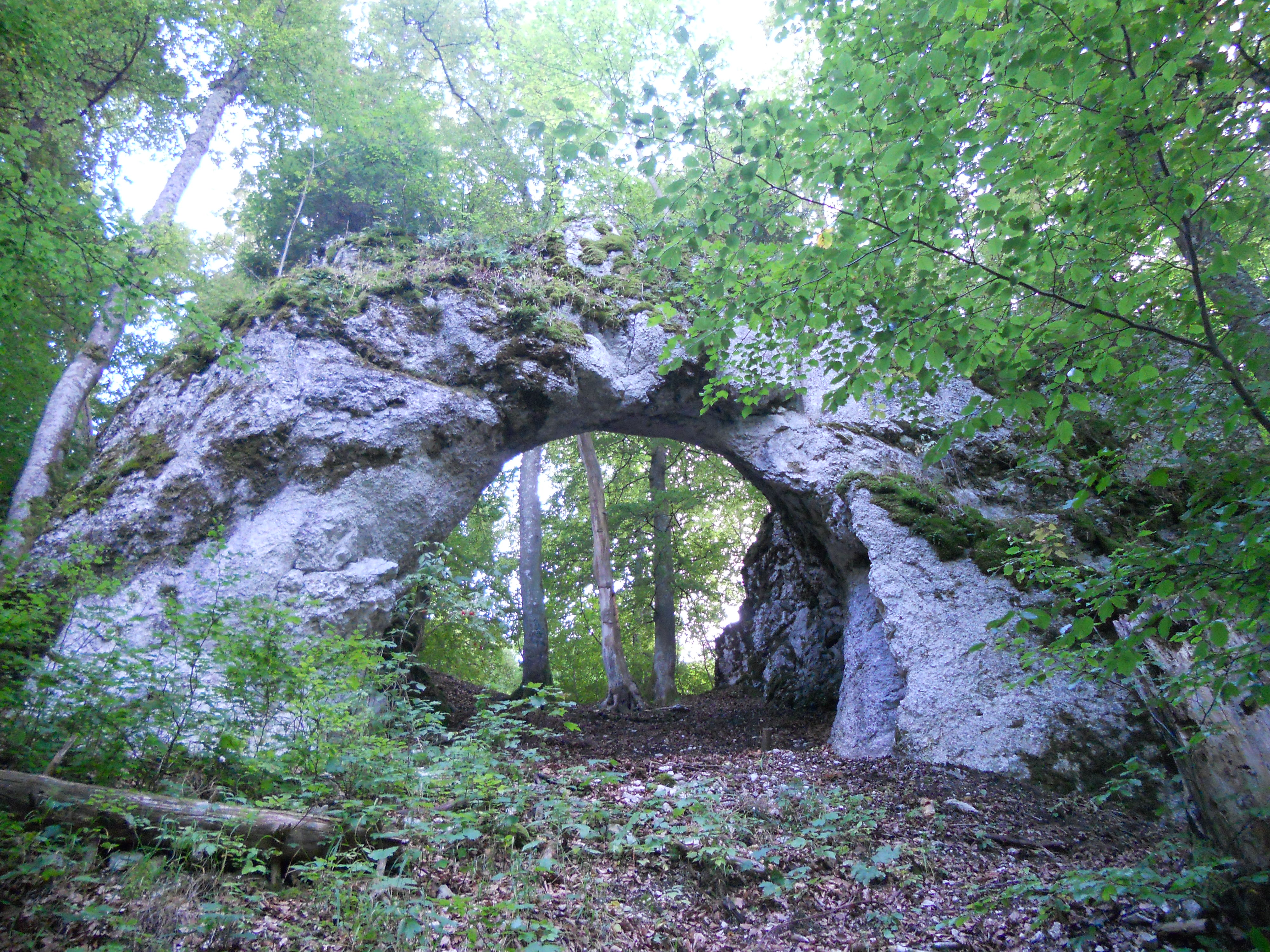 Heidentor fotografiert von der Talseite Heidentor, picture taken uphill